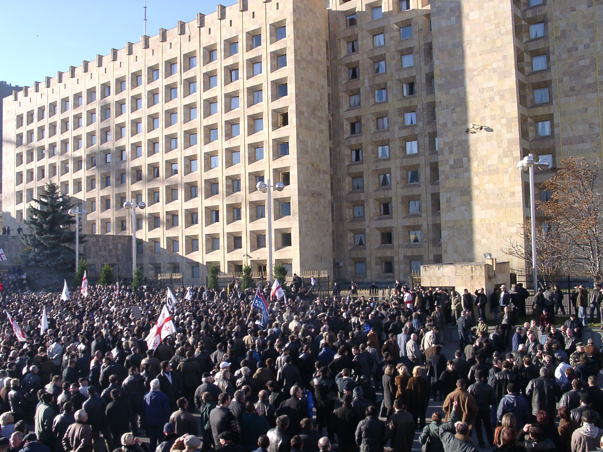 Tbilisi, Rose Revolution 2003.